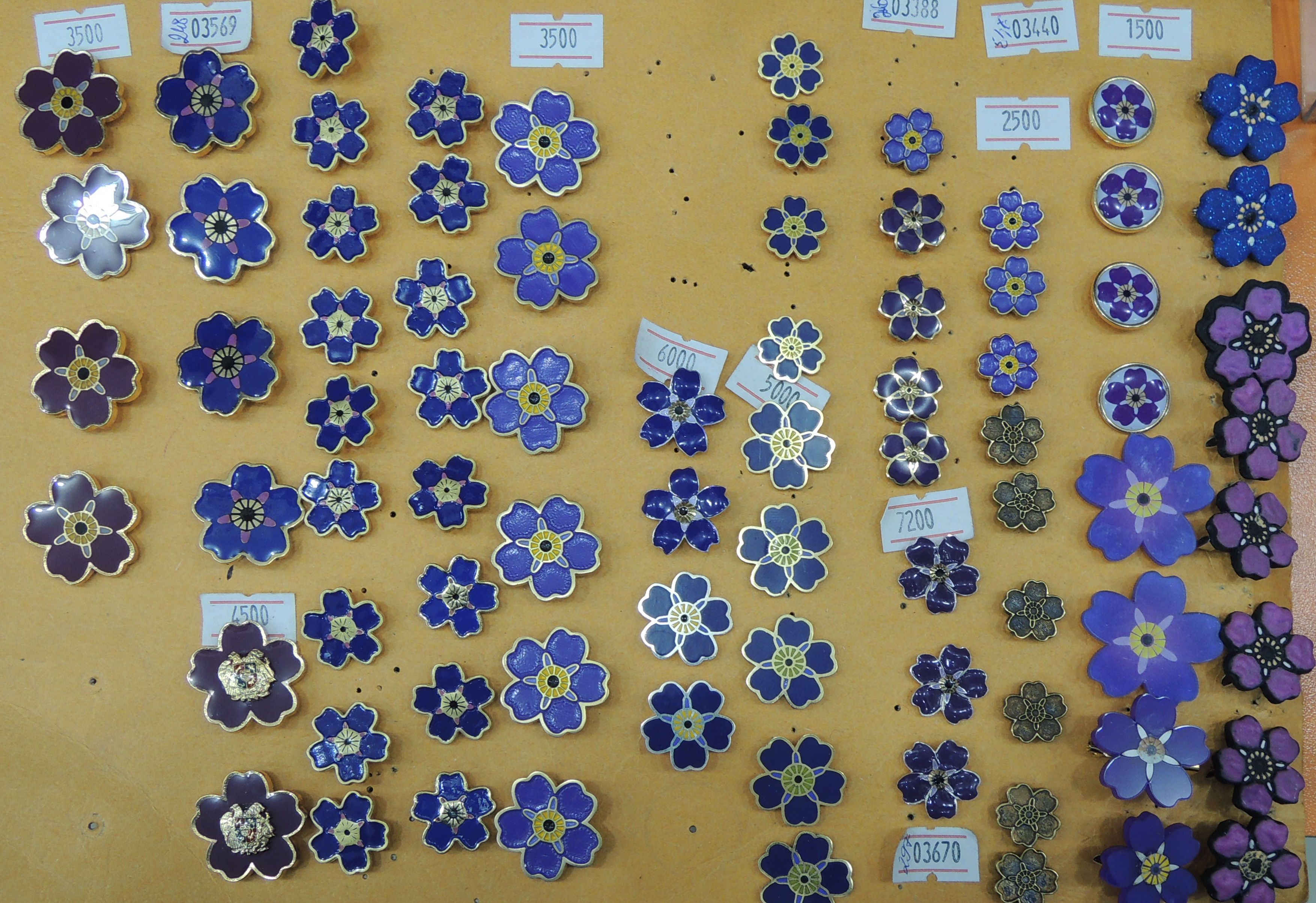 Armenian forget-me-not souvenirs (2015)